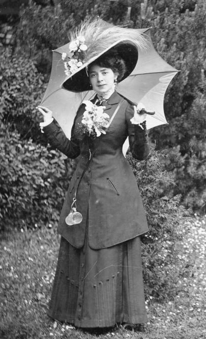 Fritzi Massary Fritzi Massari in Karlsbad Die beliebte und gefeierte Diva des Berliner Metropoltheaters weilt zum Kurgebrauch in dem böhmischen Weltbad. [Karlsbad, Fritzi Massary mit Sonnenschirm] Abgebildete Personen: Massary, Fritzi: Operettensängerin, Österreich (GND 118731572)